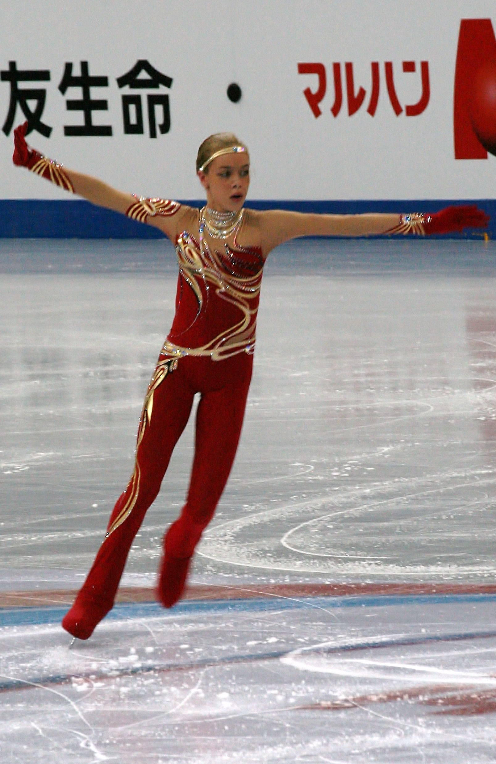 Анна Погорилая (Россия) на финале Гран-при среди юниоров 2012-2013. Короткая программа.